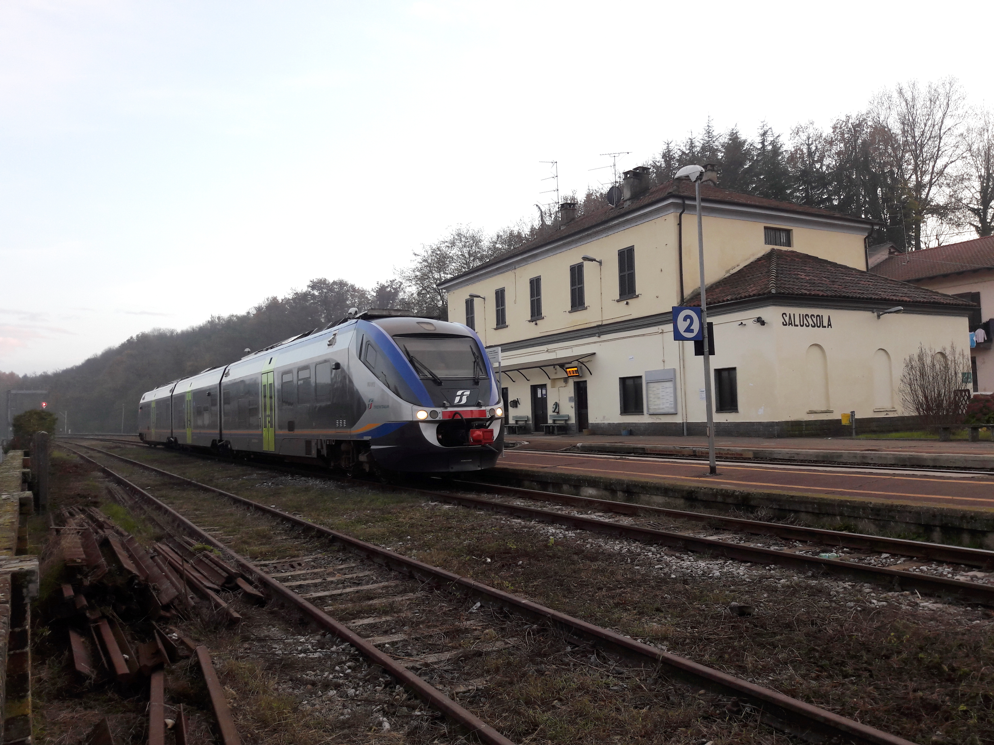 Regionale 4087 sul binario 2 della stazione di Salussola per Biella, in attesa dell'incrocio con il reg. 4088 per Santhià. Il treno è un Minuetto nella nuova livrea DTR (Divisione Trasporto Regionale) di Trenitalia.